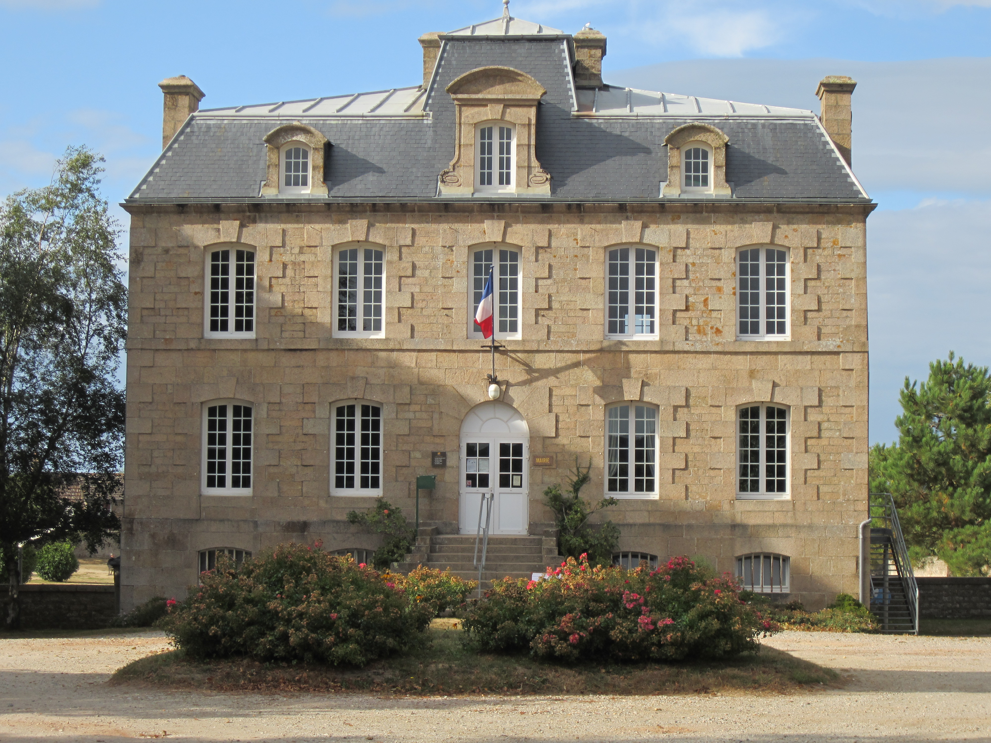 Fermanville, Manche